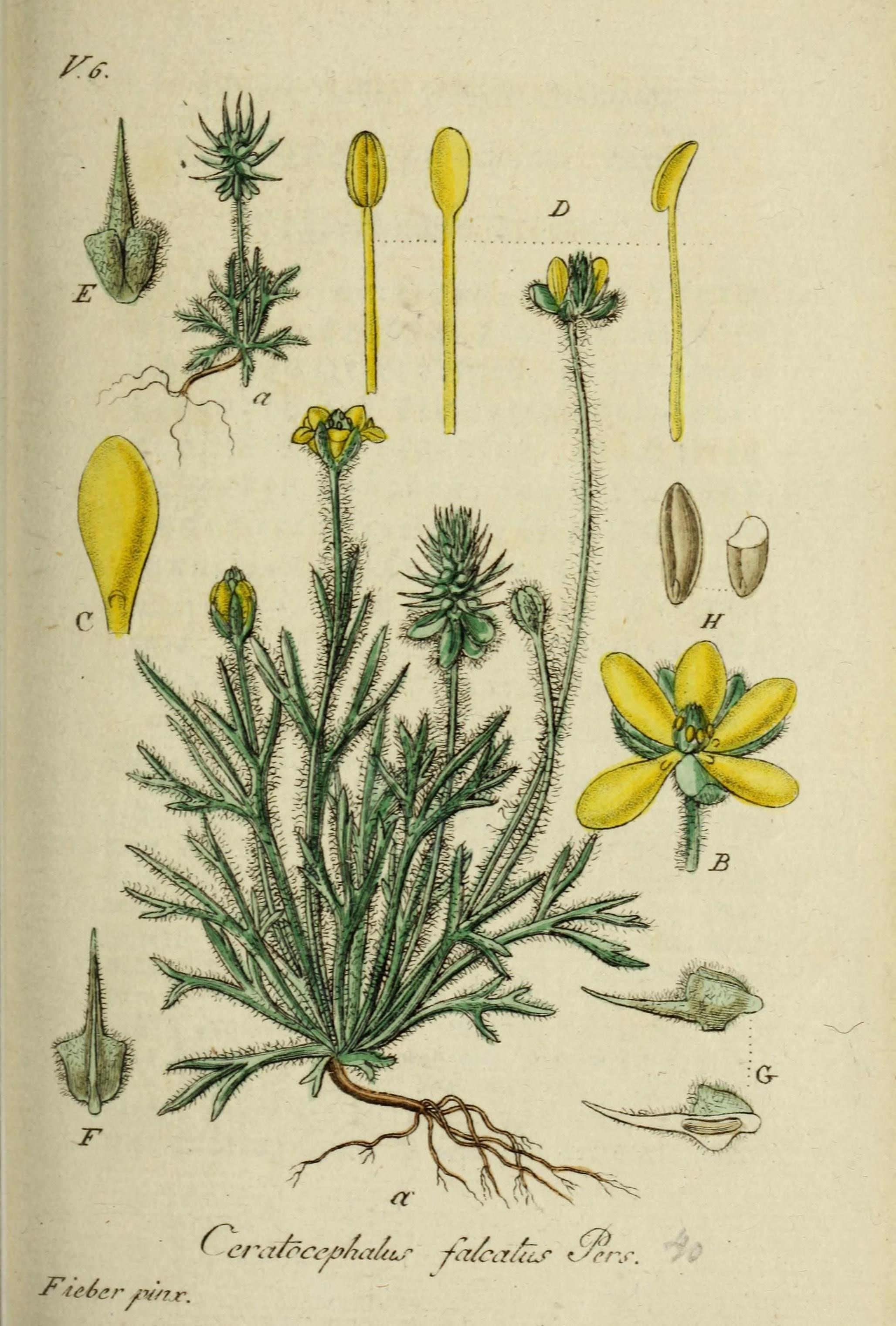 Deutschlands flora in abbildungen nach der natur /